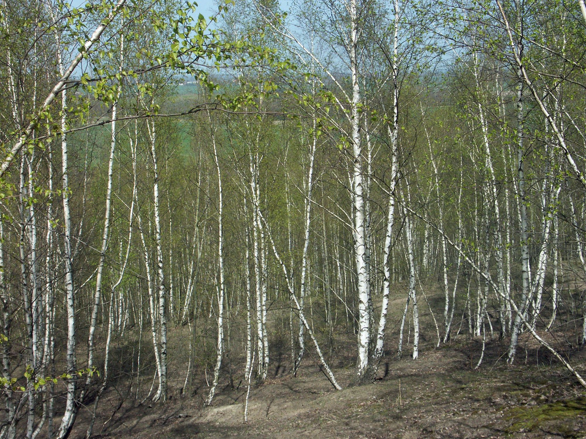 Halde Trages - Birkenwald am Nordhang